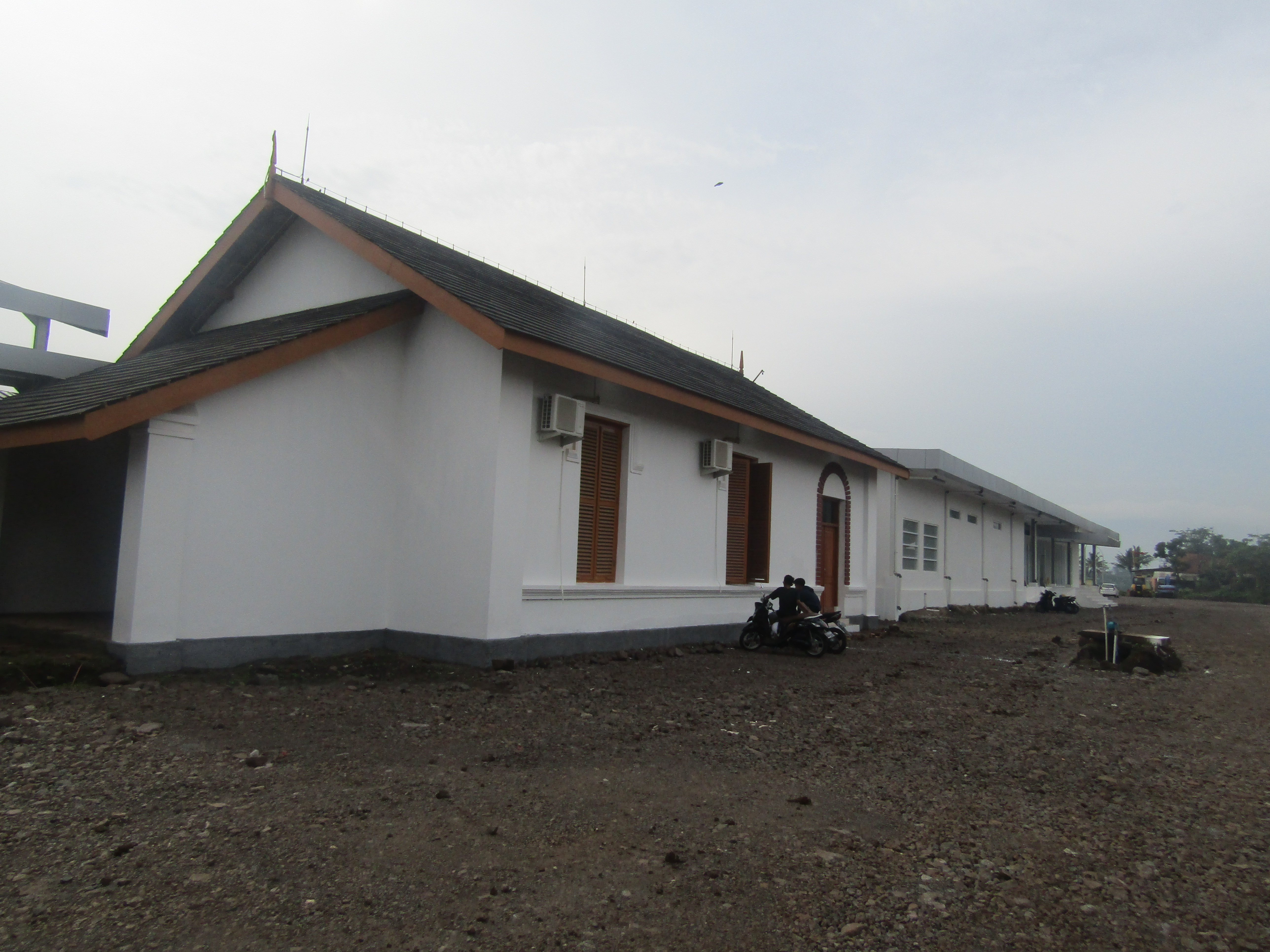 Stasiun Pasirjengkol, 2020